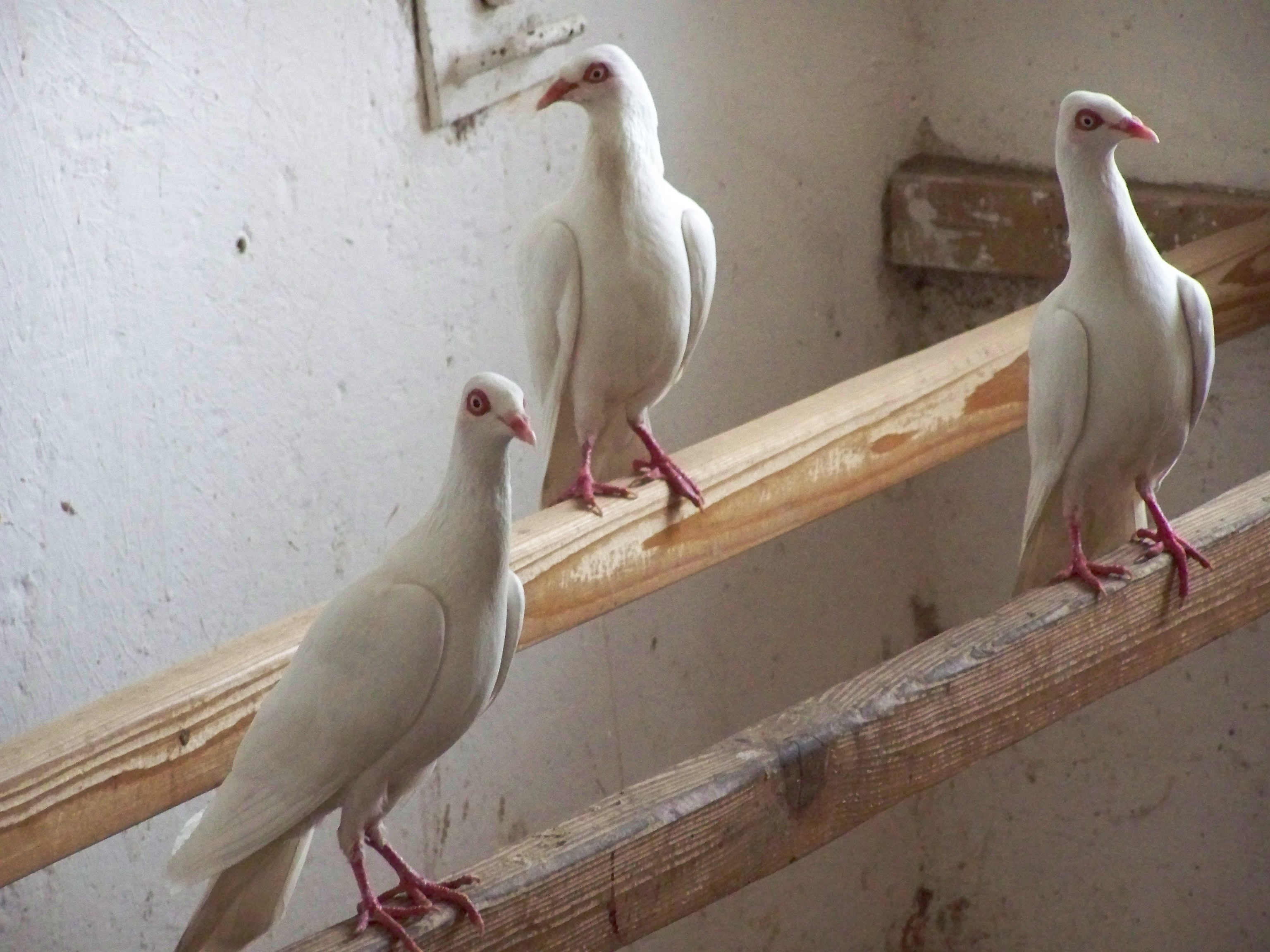 Tauben, Rasse "Stralsunder Hochflieger".